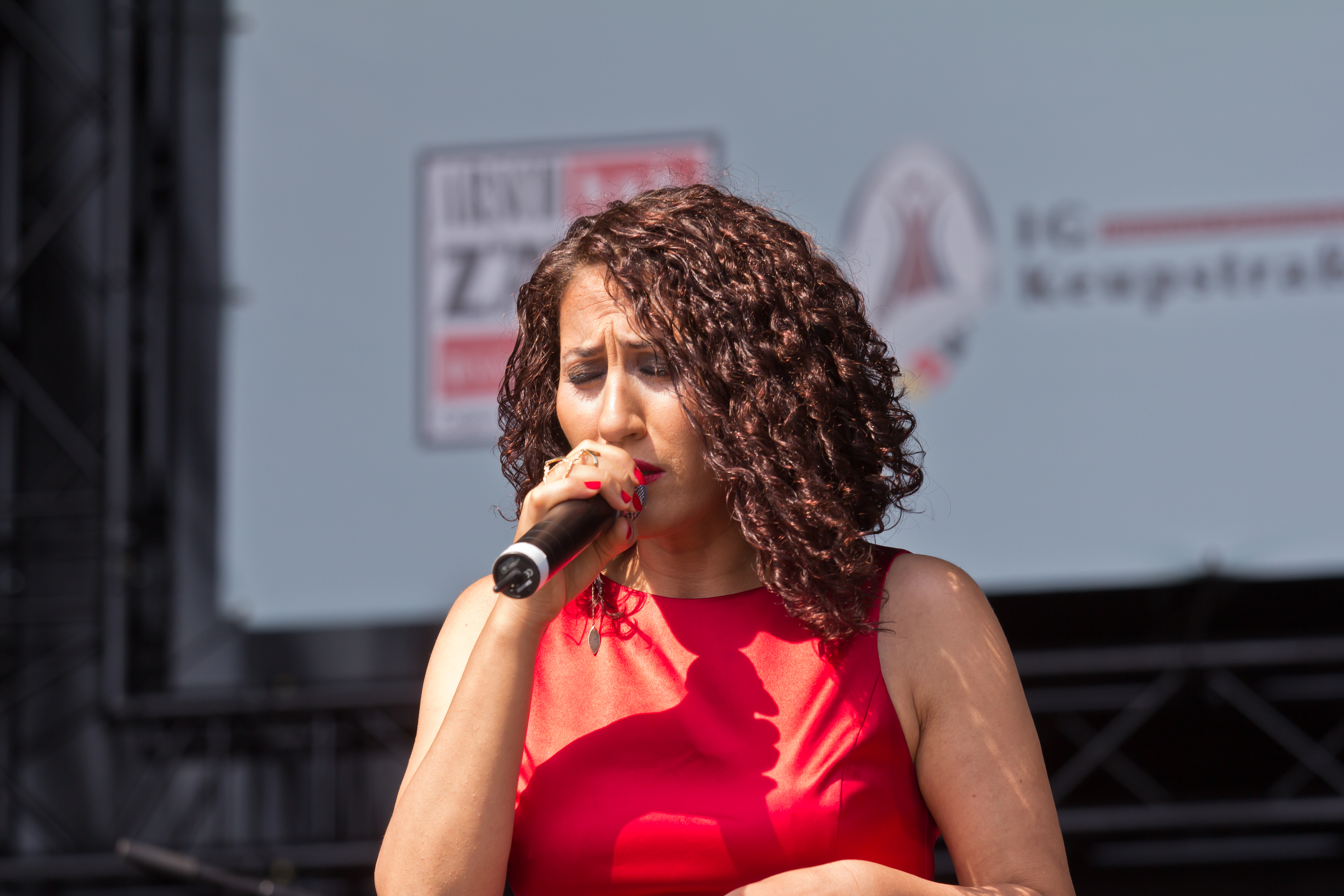 Birlikte - Kundgebung - Aynur Doğan